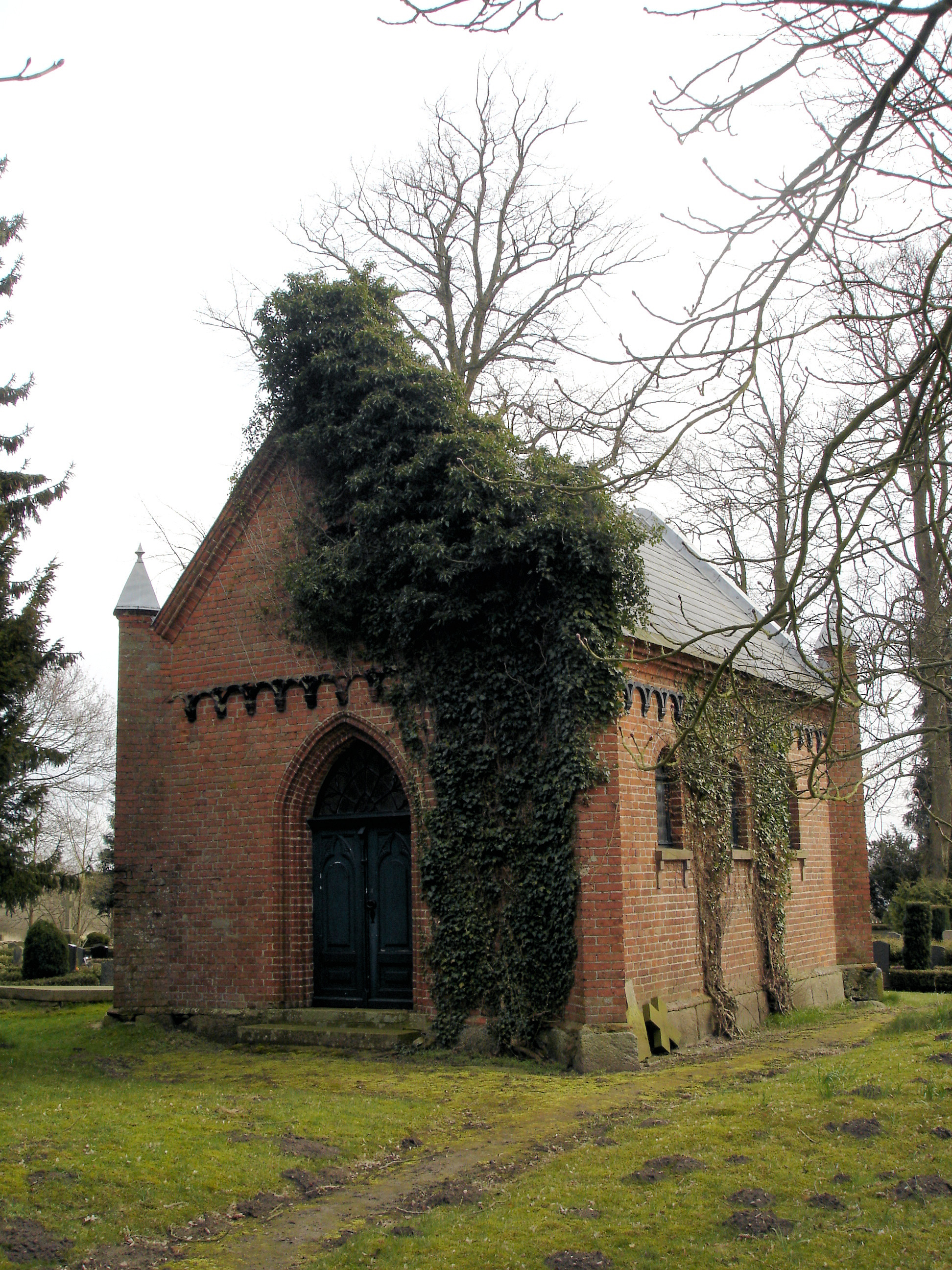 Kirche Basse, Grabkapelle / Church in Basse